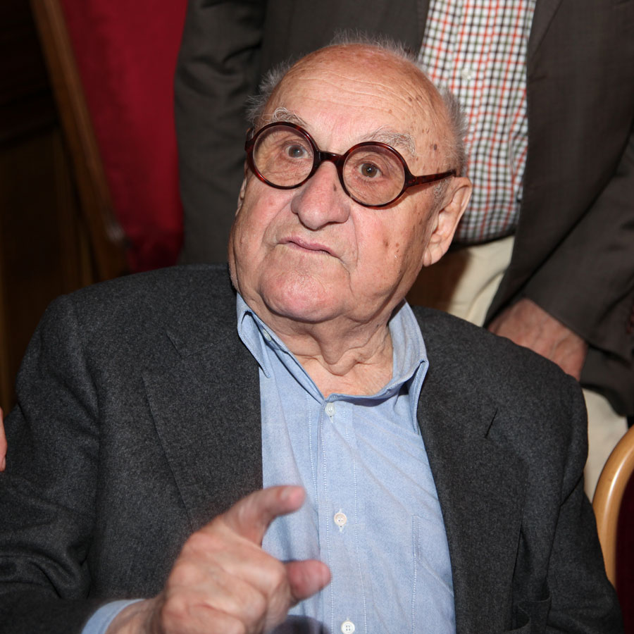 Gustav Peichl im Roten Salon des Wiener Rathauses. Anlass ist die Verleihung des Großen Goldenen Ehrenzeichens für Verdienste um das Land Wien an Luis Durnwalder.